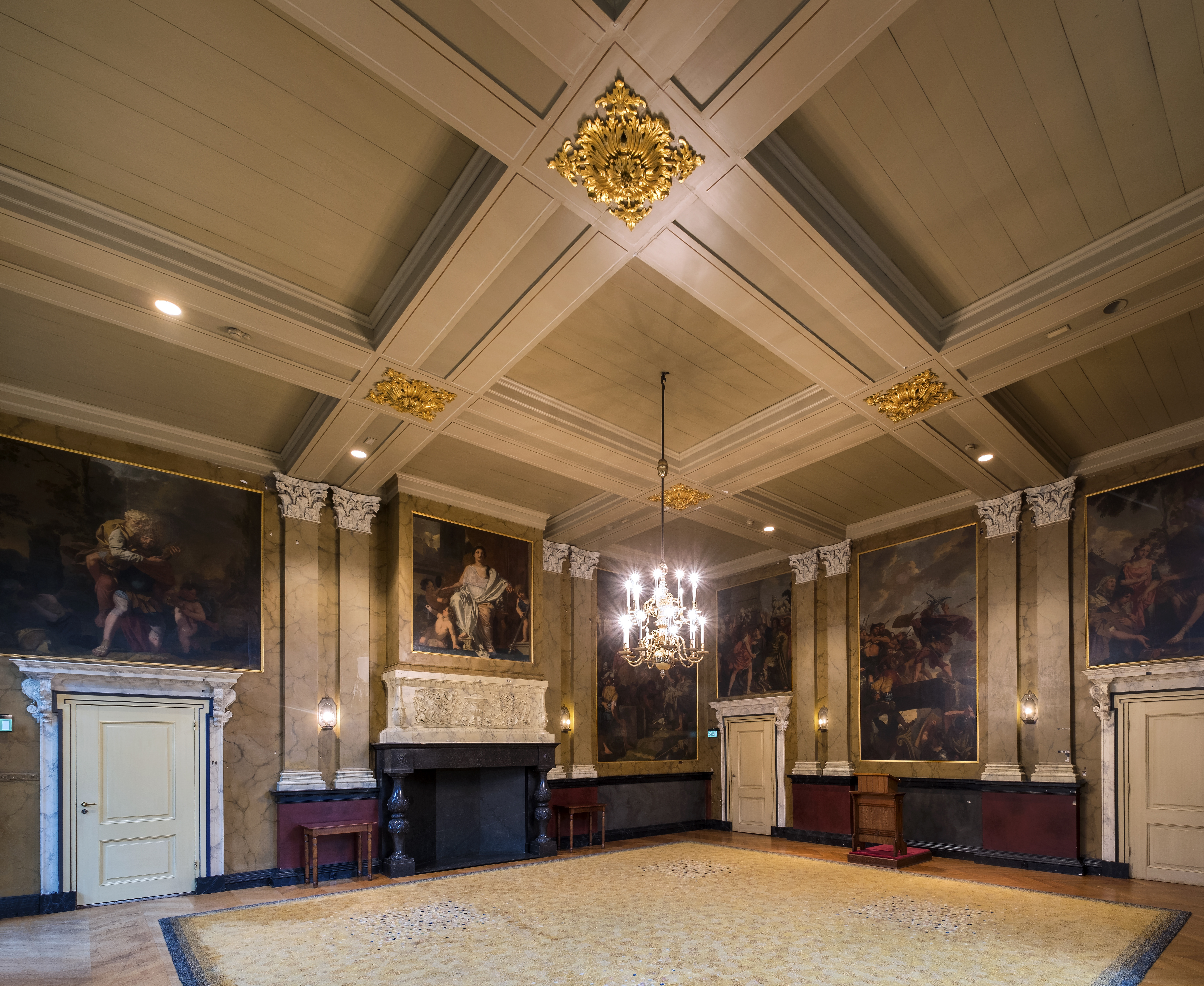 Lairessezaal, Binnenhof, Den Haag